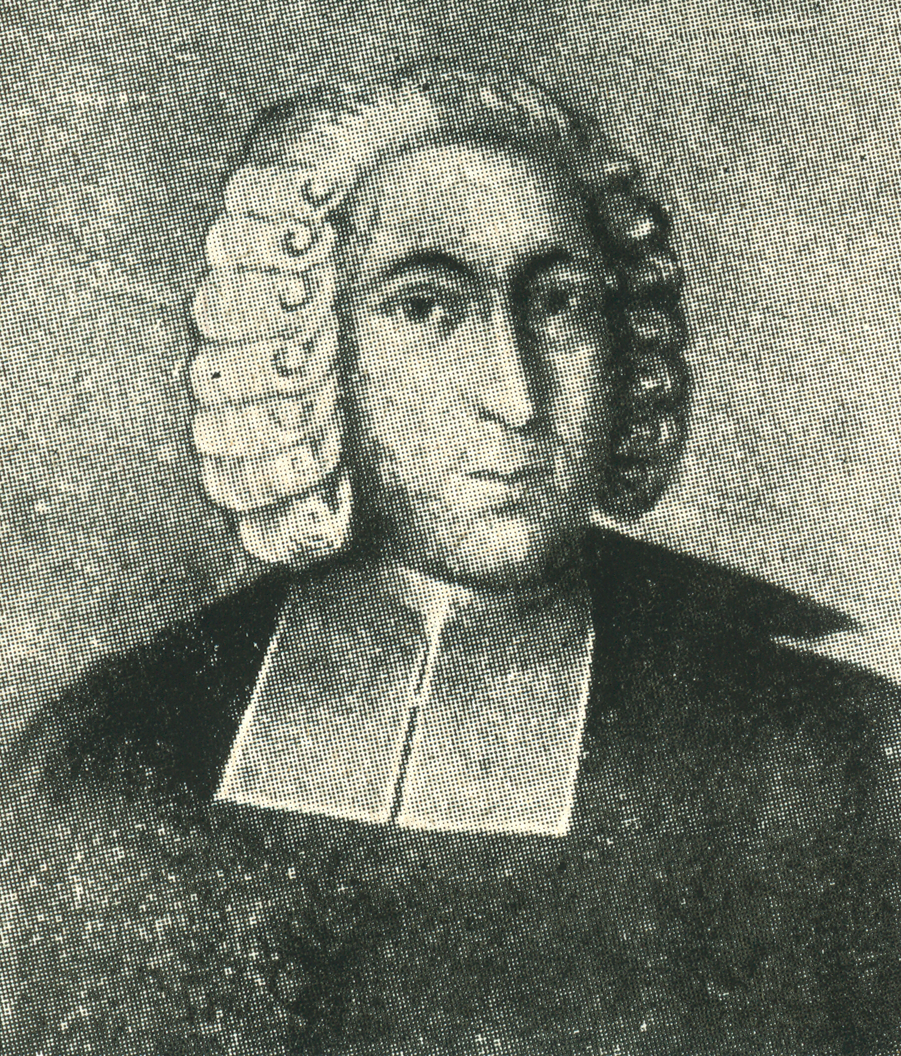 Paul Feller (1709-1788). Source: M. Faltz: Heimstätte U.L. Frau von Luxemburg, einst und jetzt. 1.-3. Tausend. Luxemburg 1920, S. 57.